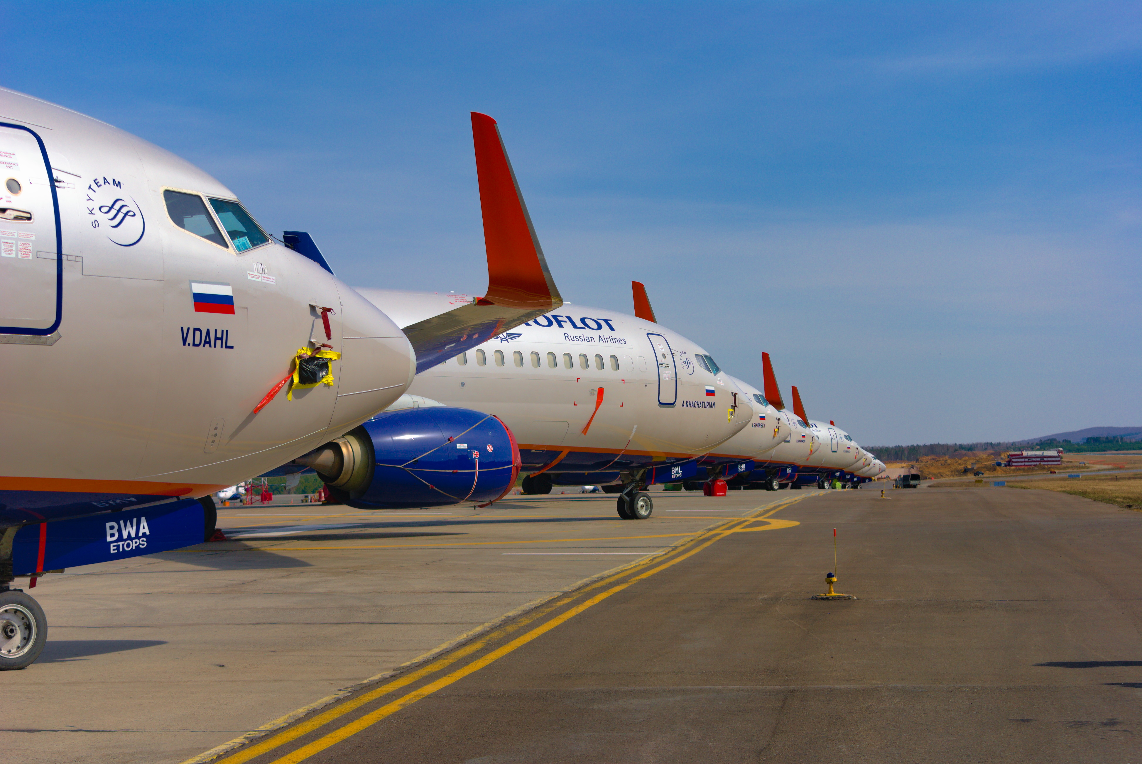 Из-за эпидемии коронавируса авиакомпании оставляют свои суда на хранение. Так Аэрофлот оставил в аэропорту Красноярска более 10 самолётов. Большая часть из них расположена на рулёжной дорожке альфа.